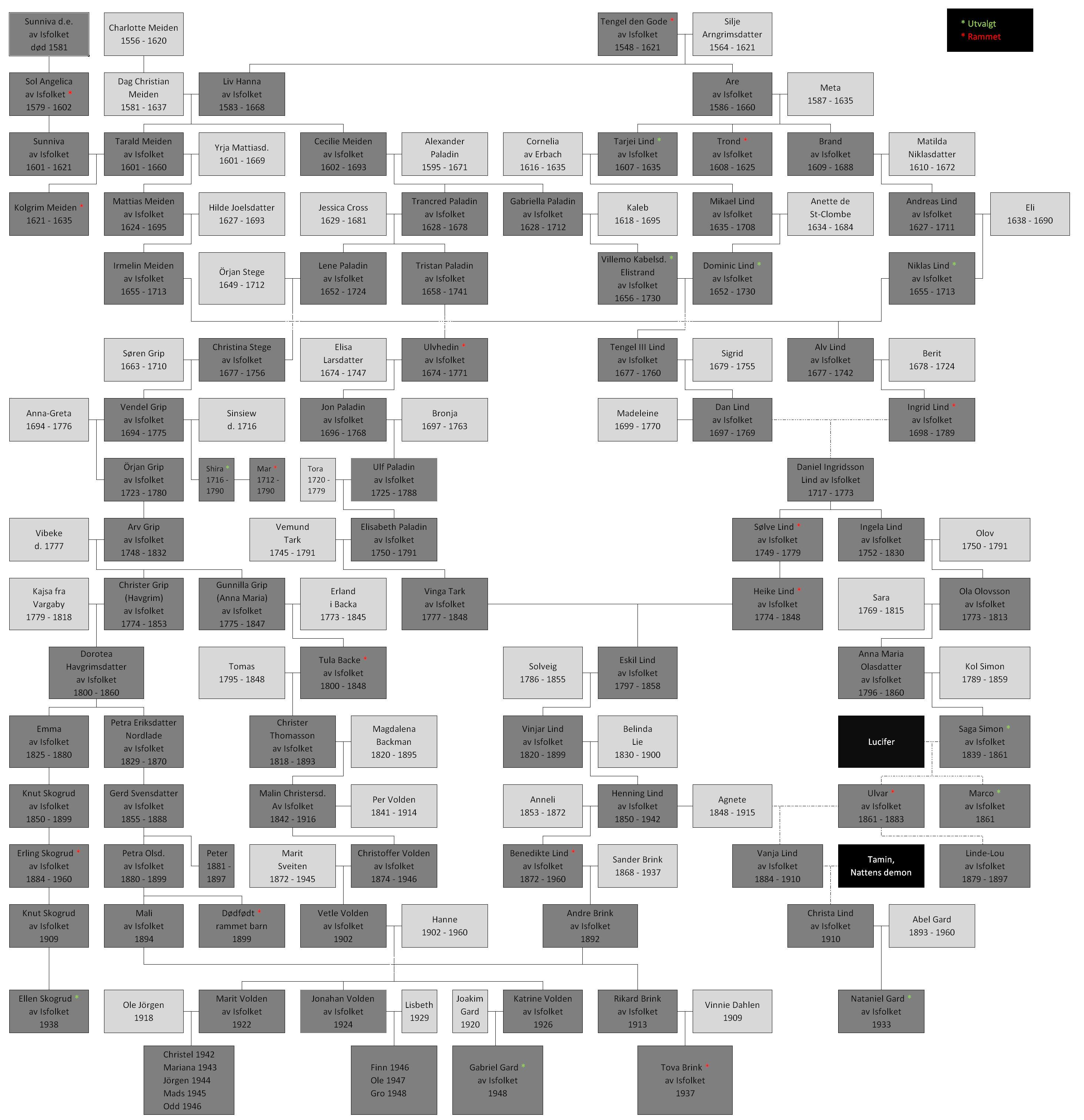 Sagaen om Isfolket - Slektstre fra Tengel den Gode.